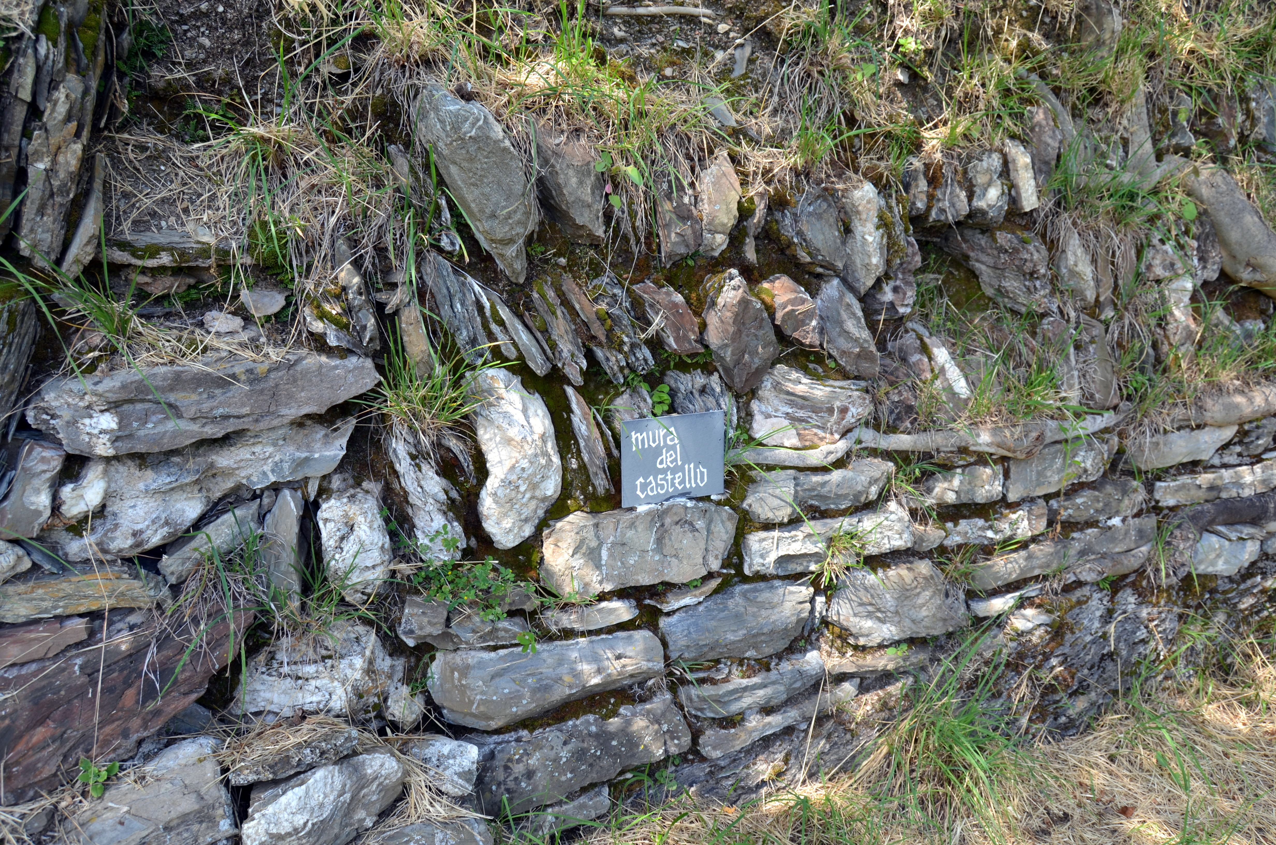 Ruderi del castello dei Fieschi di Roccatagliata, Neirone, Liguria, Italia